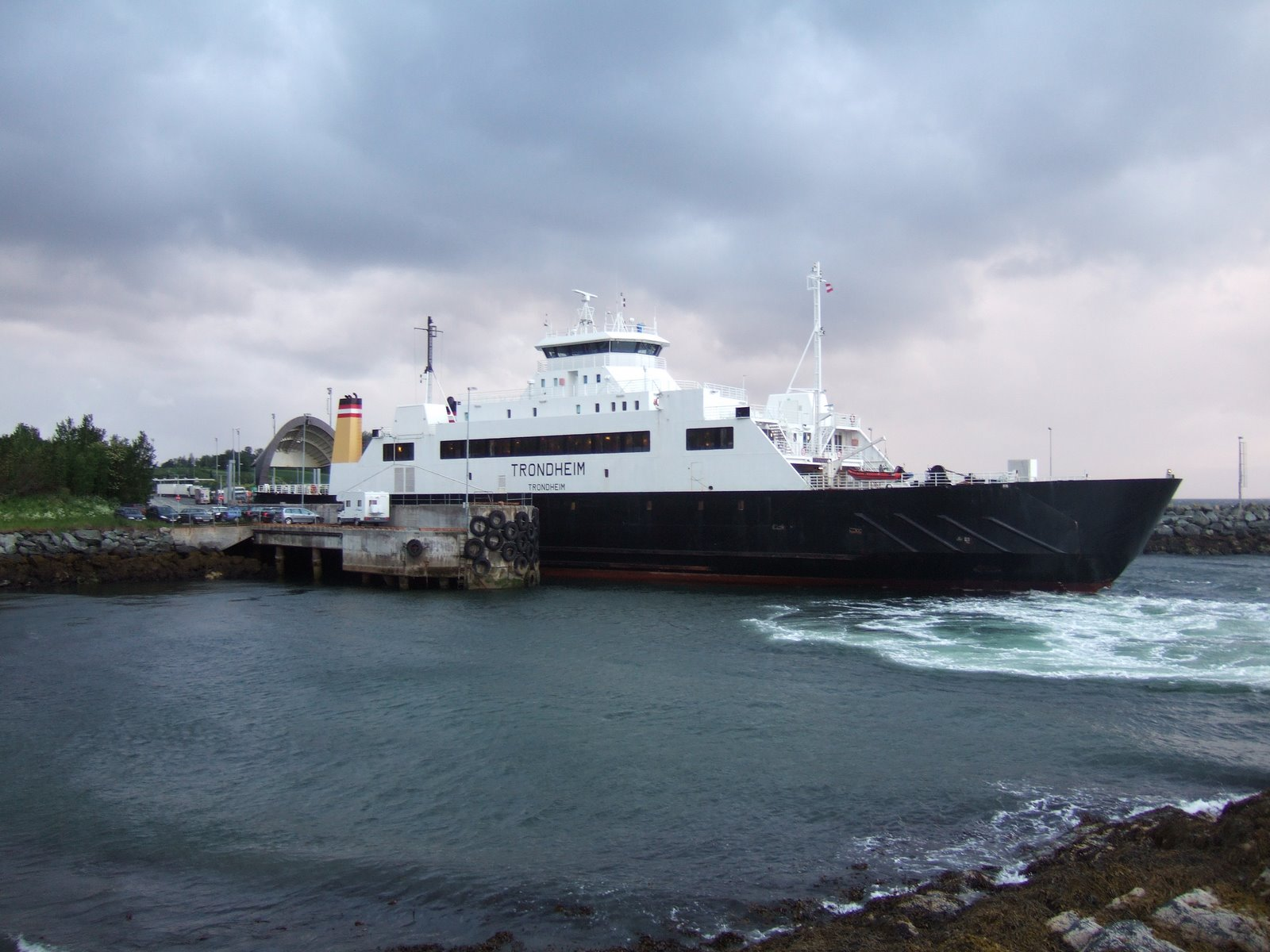 Trondheim... hier begon het te regen, en dat bleef 2,5 weken zo.